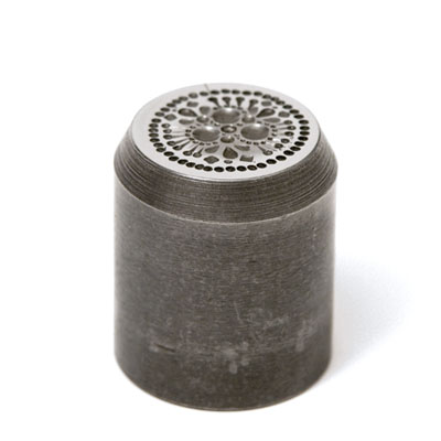 Poncolt sajtolószerszám érem veréséhez